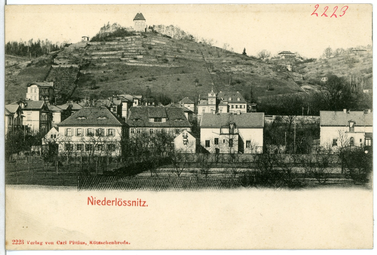 Niederlößnitz; Ansicht This postcard is from publisher Brück & Sohn in Meißen ( postcard has a unique number 02223 and is available in a higher resolution at the publisher. This images was uploaded in a cooperation project between Wikipedians and the publisher.